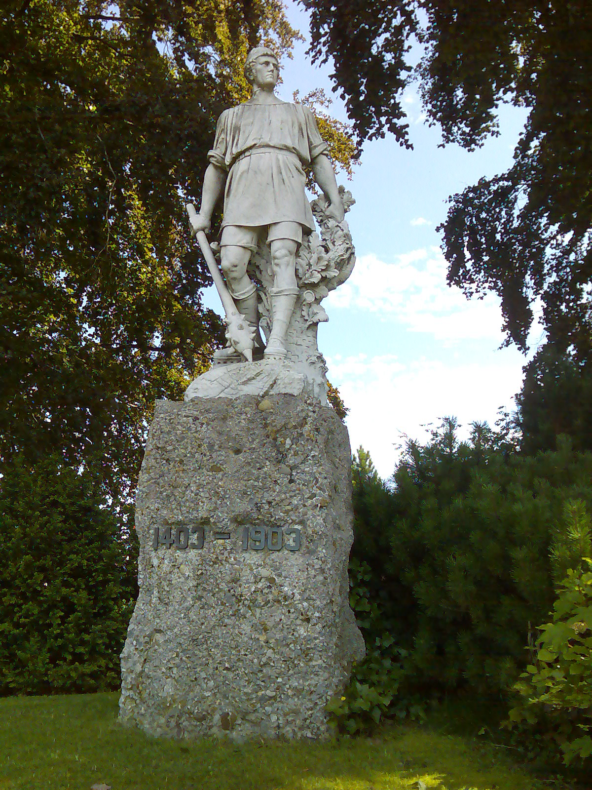 Auf einem Steinsockel mit Inschrift "1403 - 1903" steht eine lebensgrosse Statue, die einen Appenzeller Krieger, mit Morgenstern in der rechten Hand, darstellt